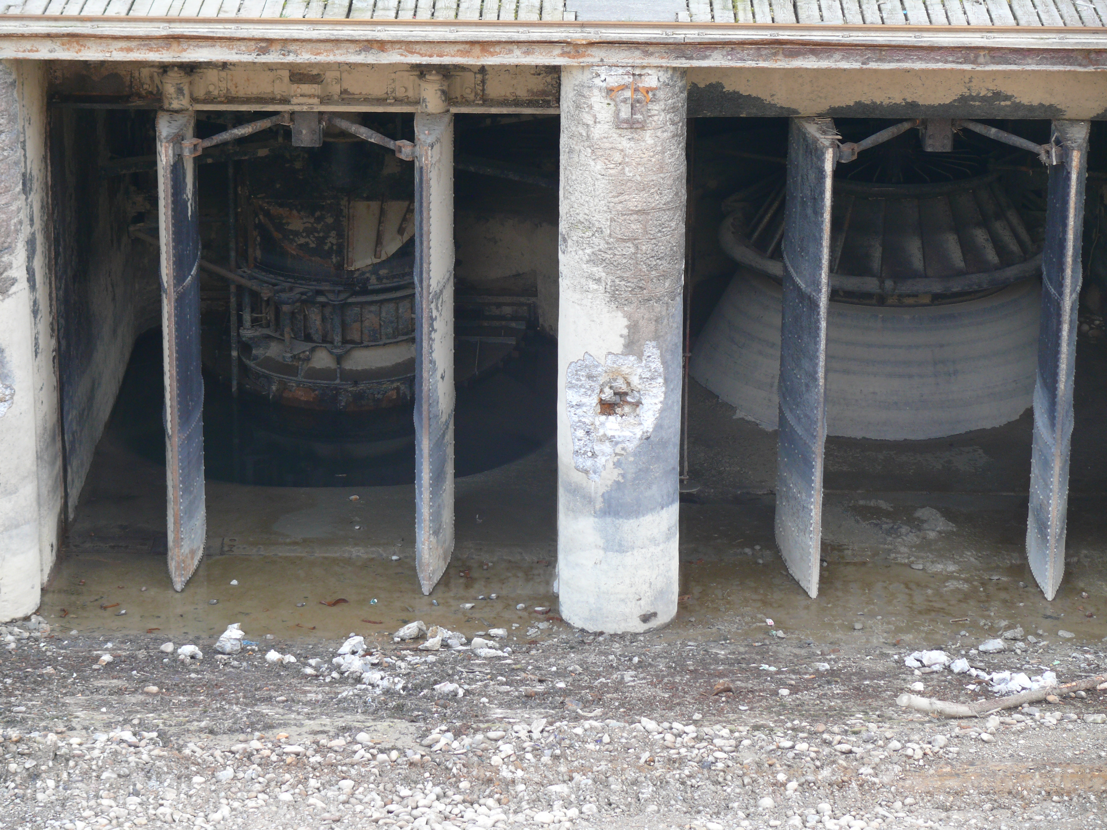 Blick in die Turbinenkammern des alten Kraftwerks, nachdem der Feinrechen abgerissen wurde. Links eine Francis - Turbine, rechts eine Kaplan - Turbine.